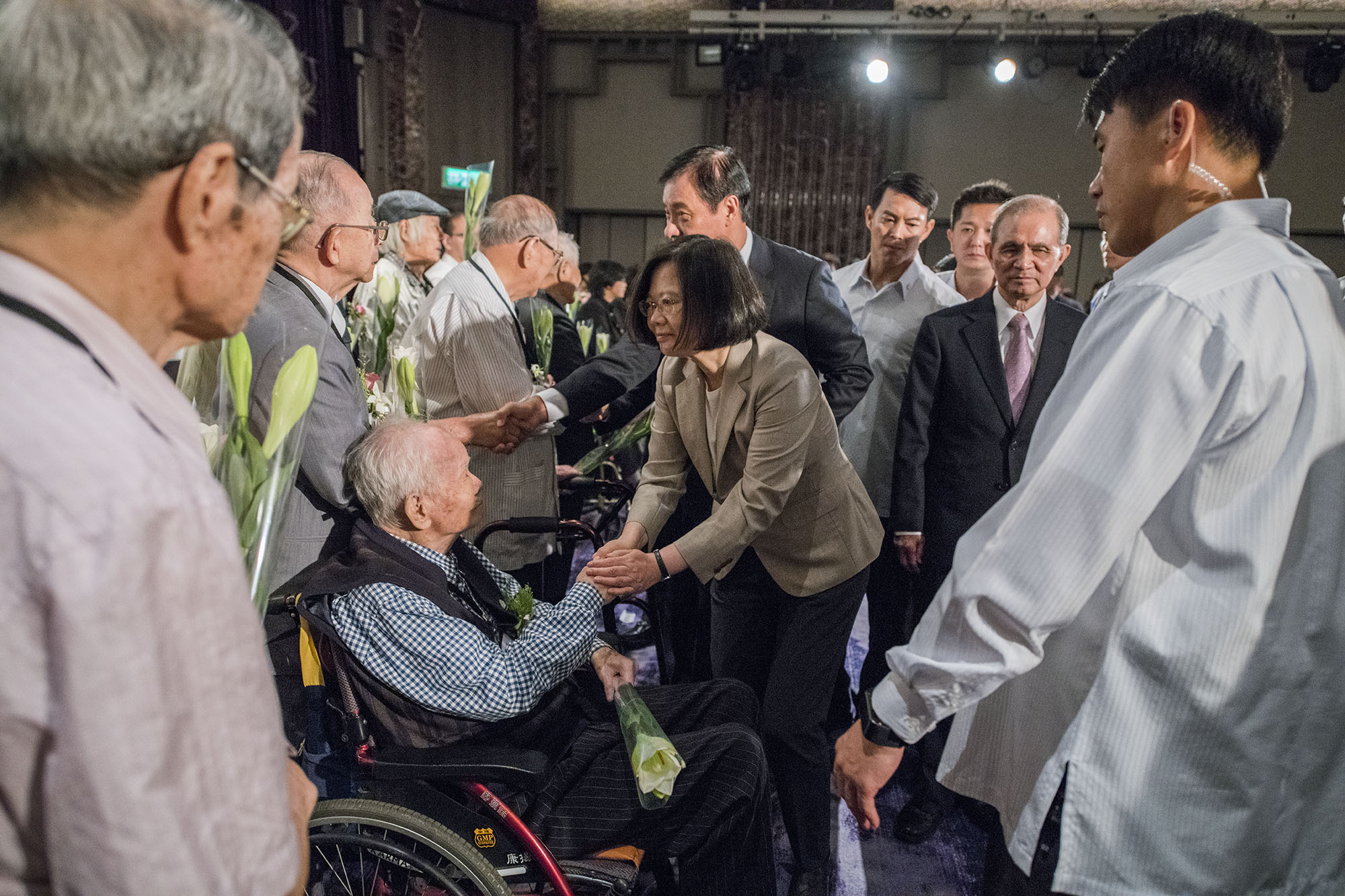 蔡英文總統與第一波塗銷名單代表致意